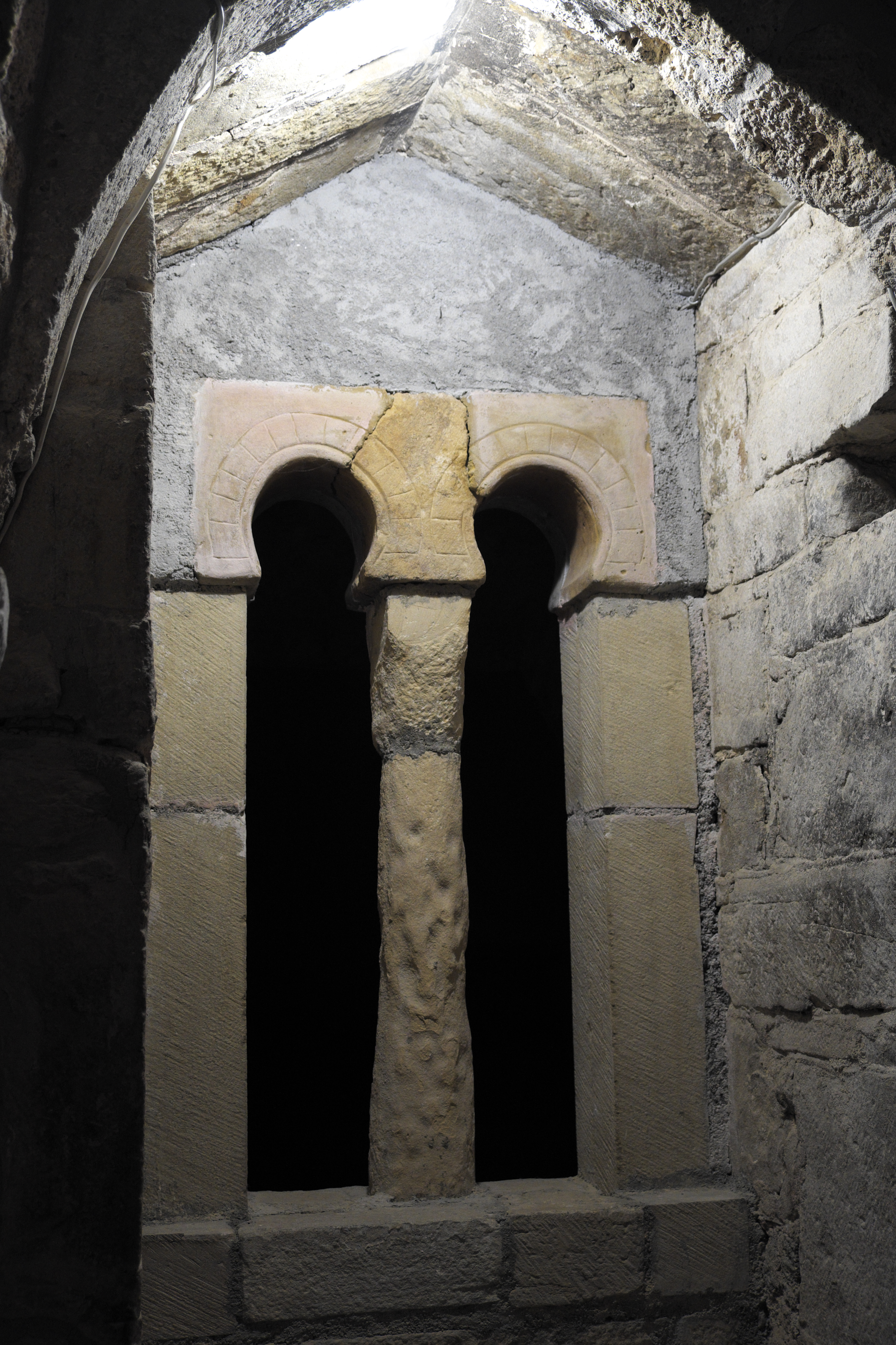 Kathedrale San Vicente in Roda de Isábena in der Provinz Huesca (Aragón/Spanien), Zwillingsfenster mit Hufeisenbogen